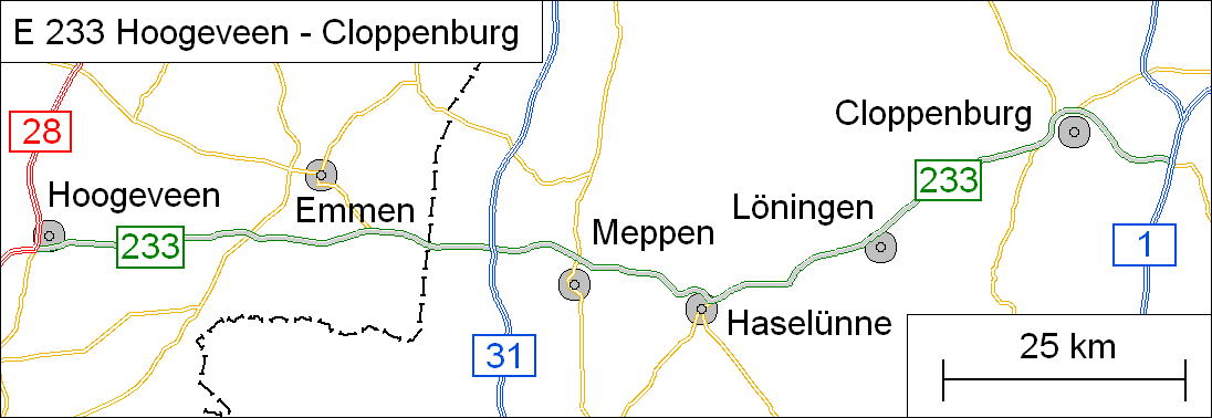 E 233 Hoogeveen - Cloppenburg self made